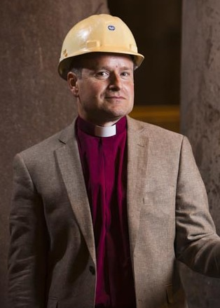 Biskop Sören Dalevi i Björneborgs Järnverk